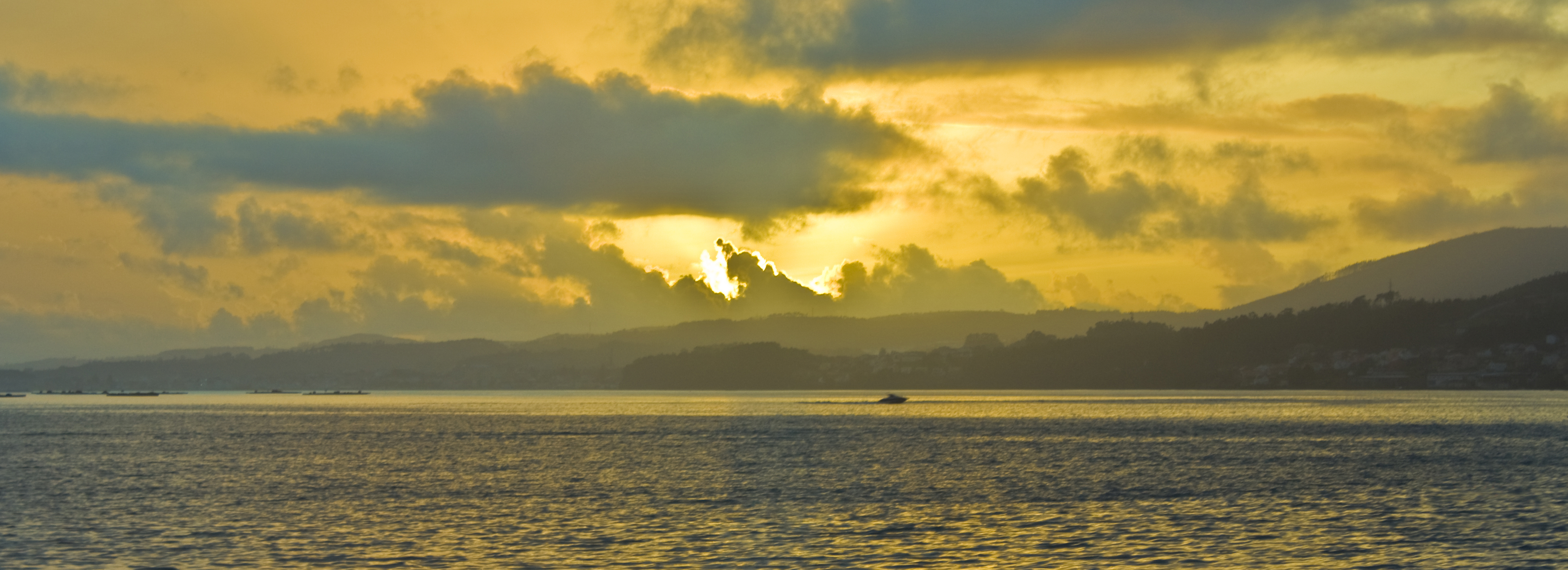 Solpor en Boiro, Galiza. 42°38'27"N, 8°53'18"W (42.6407, -8.8882)